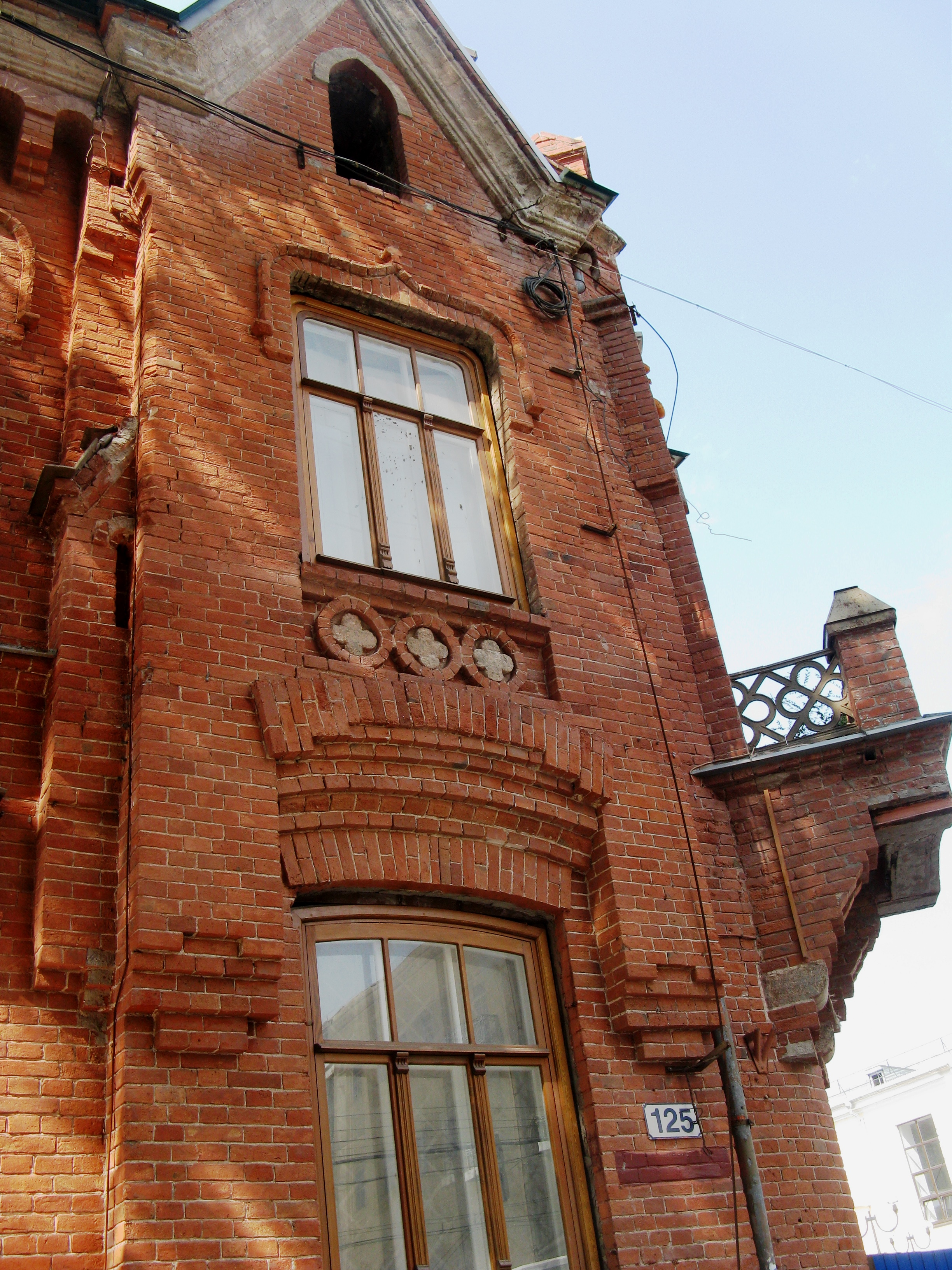 Дом братьев Мартын (Ростовская область, Ростов-на-Дону, Большая Садовая улица, 125)